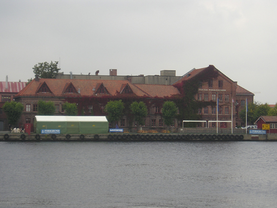 The "Porsgrund Porselaensfabrik A/S", Porsgrunn, Norway